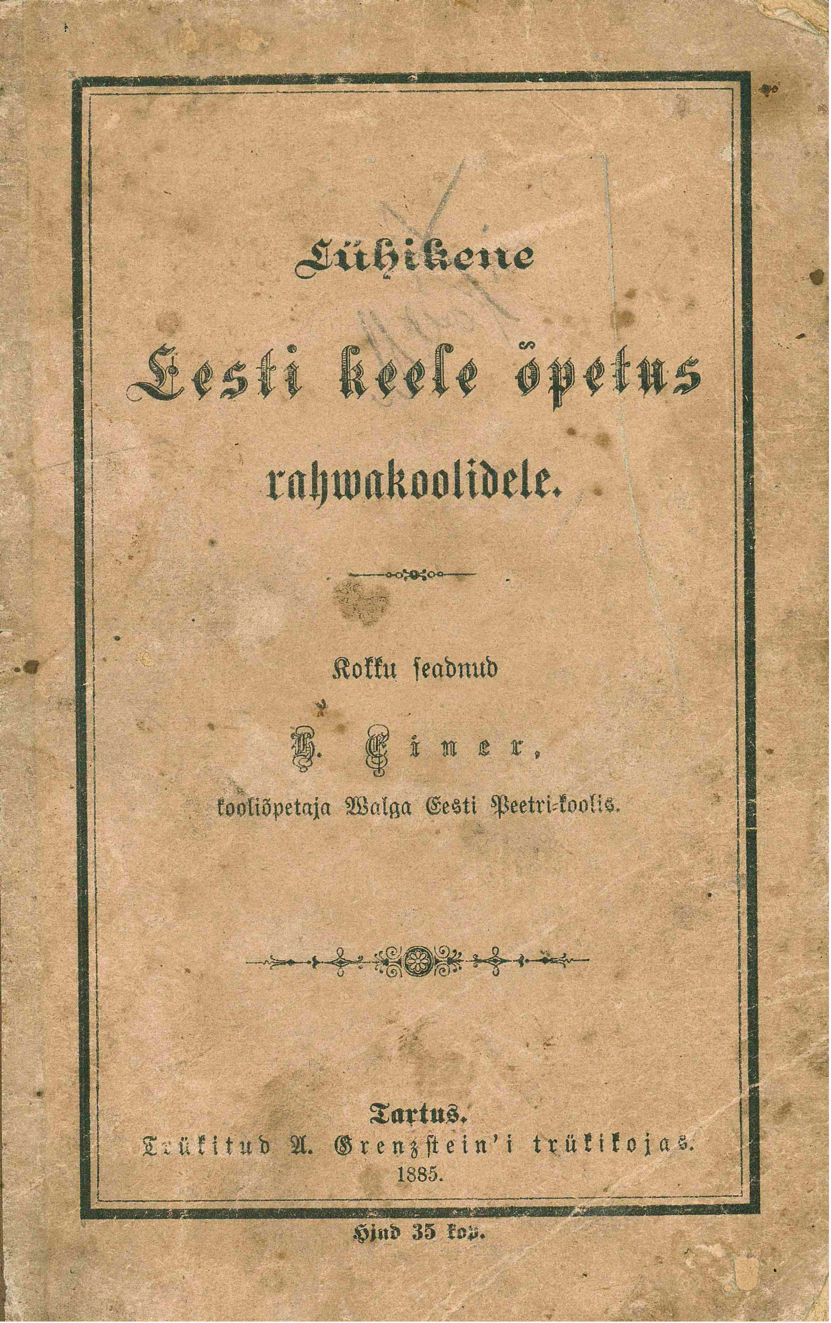 Lühikene eesti keele õpetus rahwakoolidele, H. Einer, Tartu, A.Grenzsteini trükk, 1885